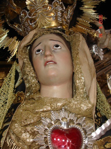 Santísima Virgen Dolorosa de la Soledad del Templo de Santo Domingo de la ciudad de Popayán, Colombia. Escultura en madera, elaborada en Cadíz (España) en el siglo XVIII por José Fernández Guerrero con joyas y ornamentos de oro y plata.